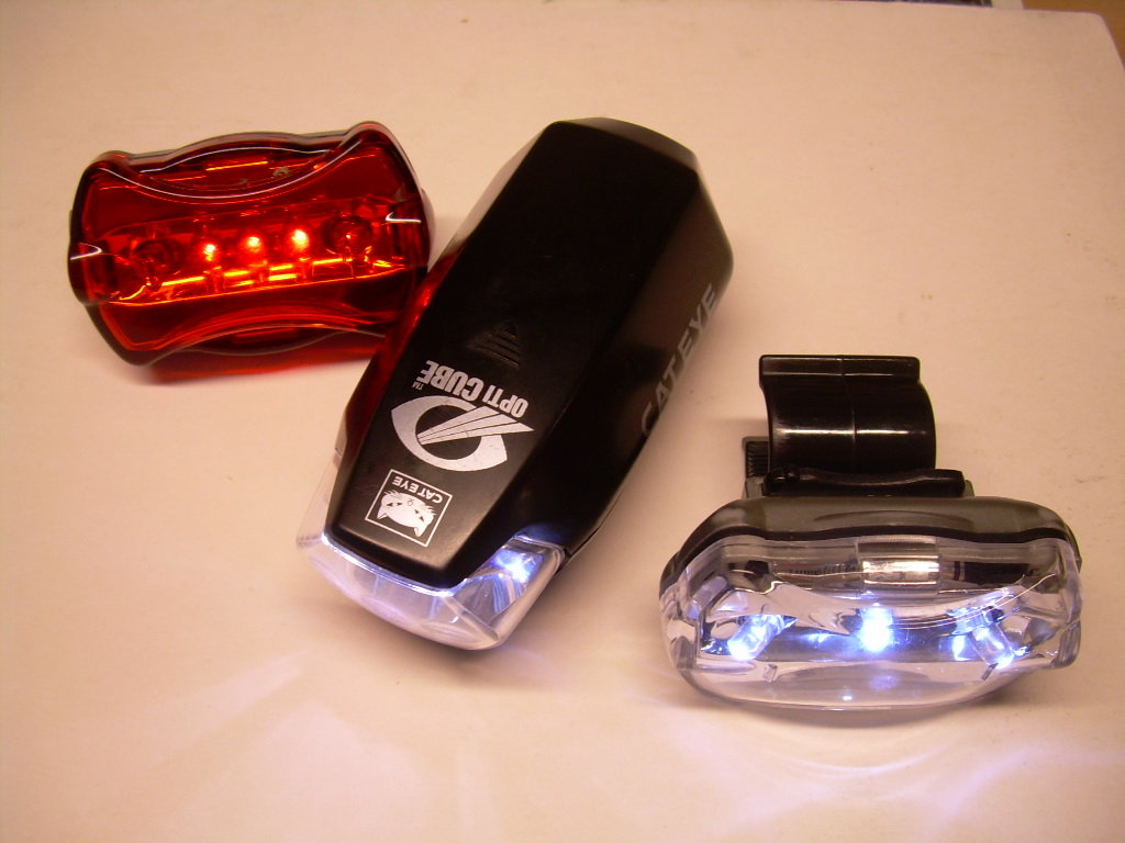 Bike lights